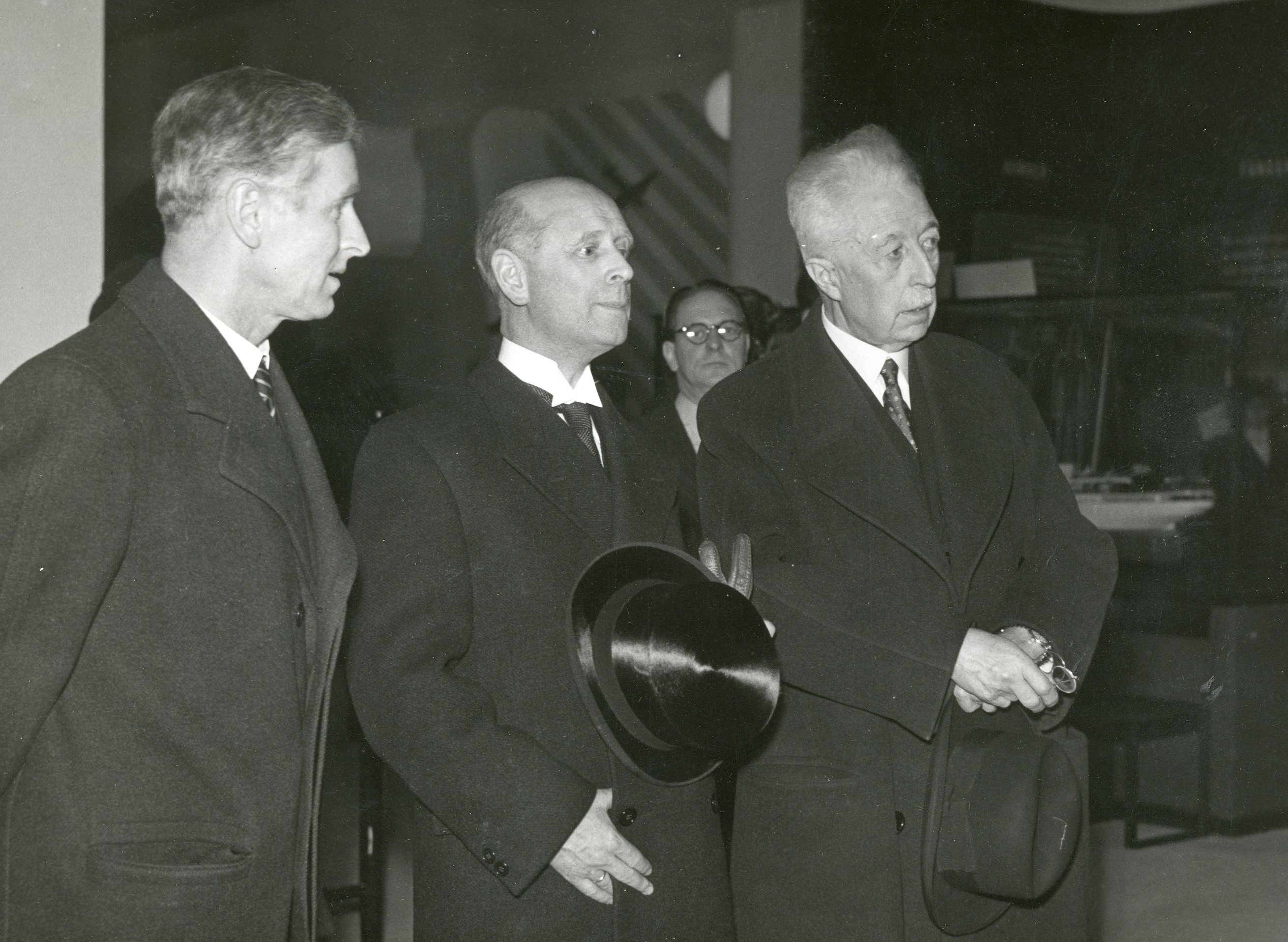 Den norske militærattache oberstløytnant Smith-Kielland, minister Bull og prins Eugen RA/PA-1209/Uc/66/4/S 329